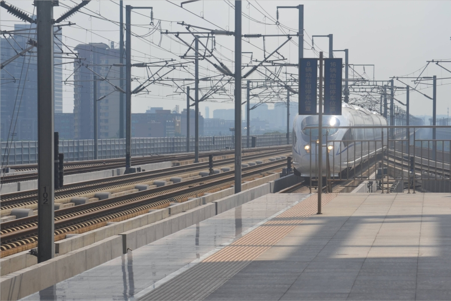 Hochgeschwindigkeitsstrecke Peking-Shanghai